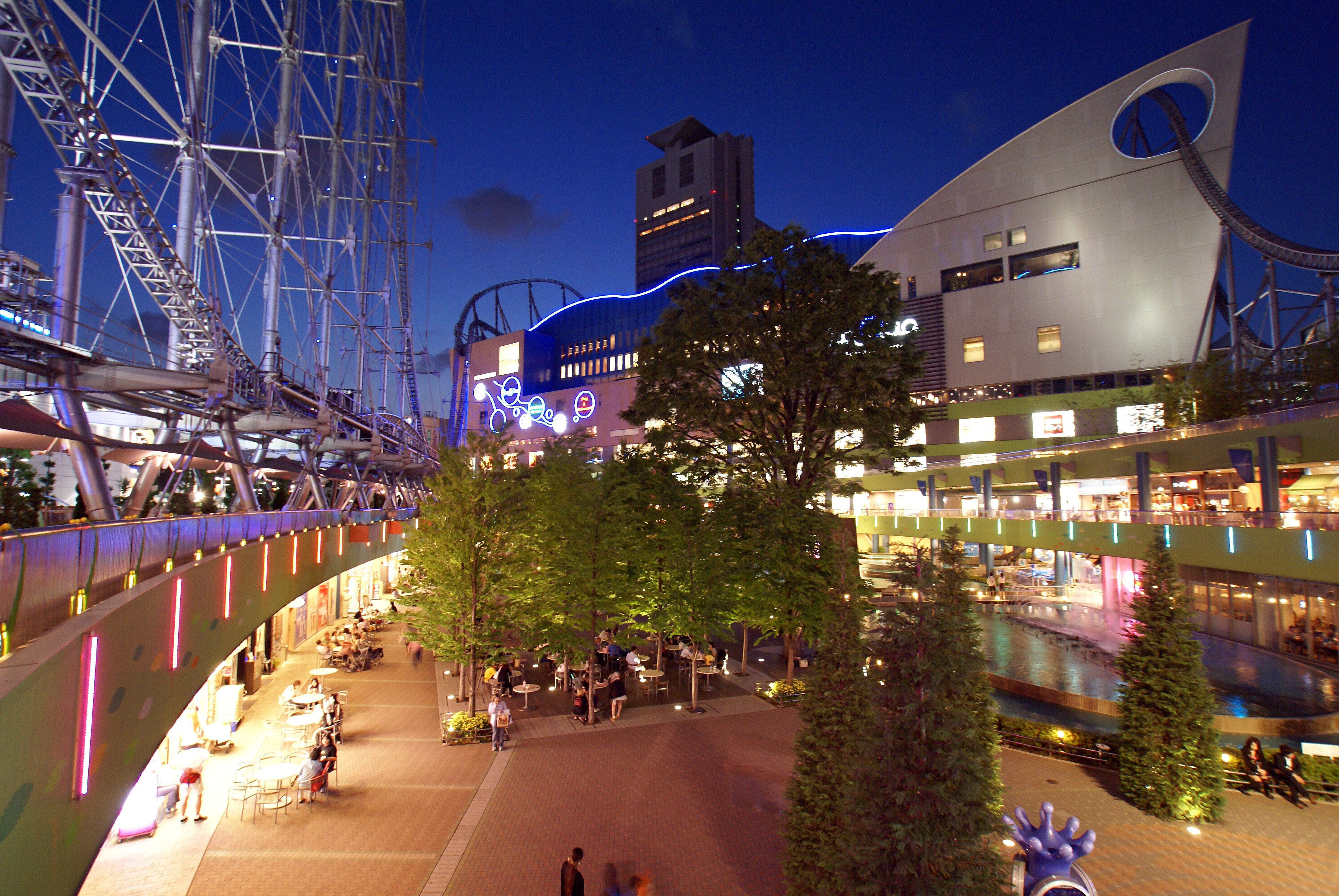 LaQua in Bunkyo-ku, Tokyo, Japan